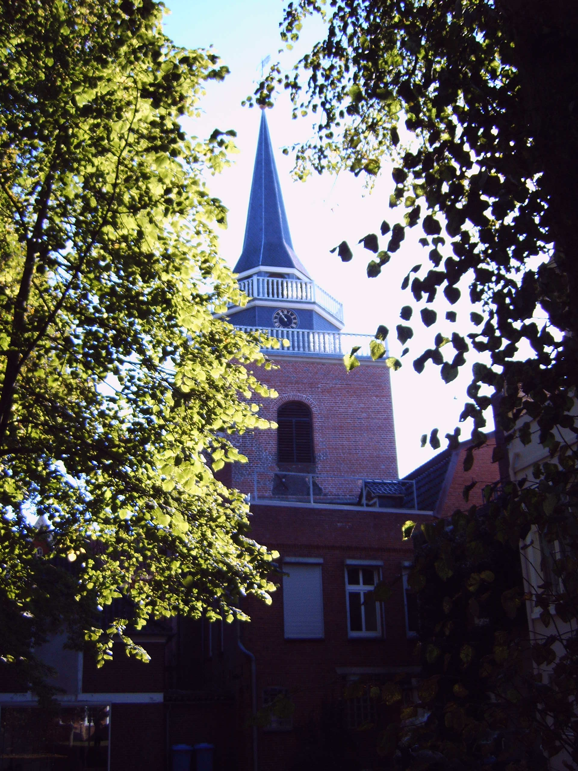 Lambertiturm in Aurich, Bild aufgenommen am 4.10.2005 durch Olaf Meister